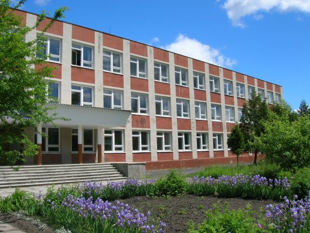 Мирненська ЗОШ